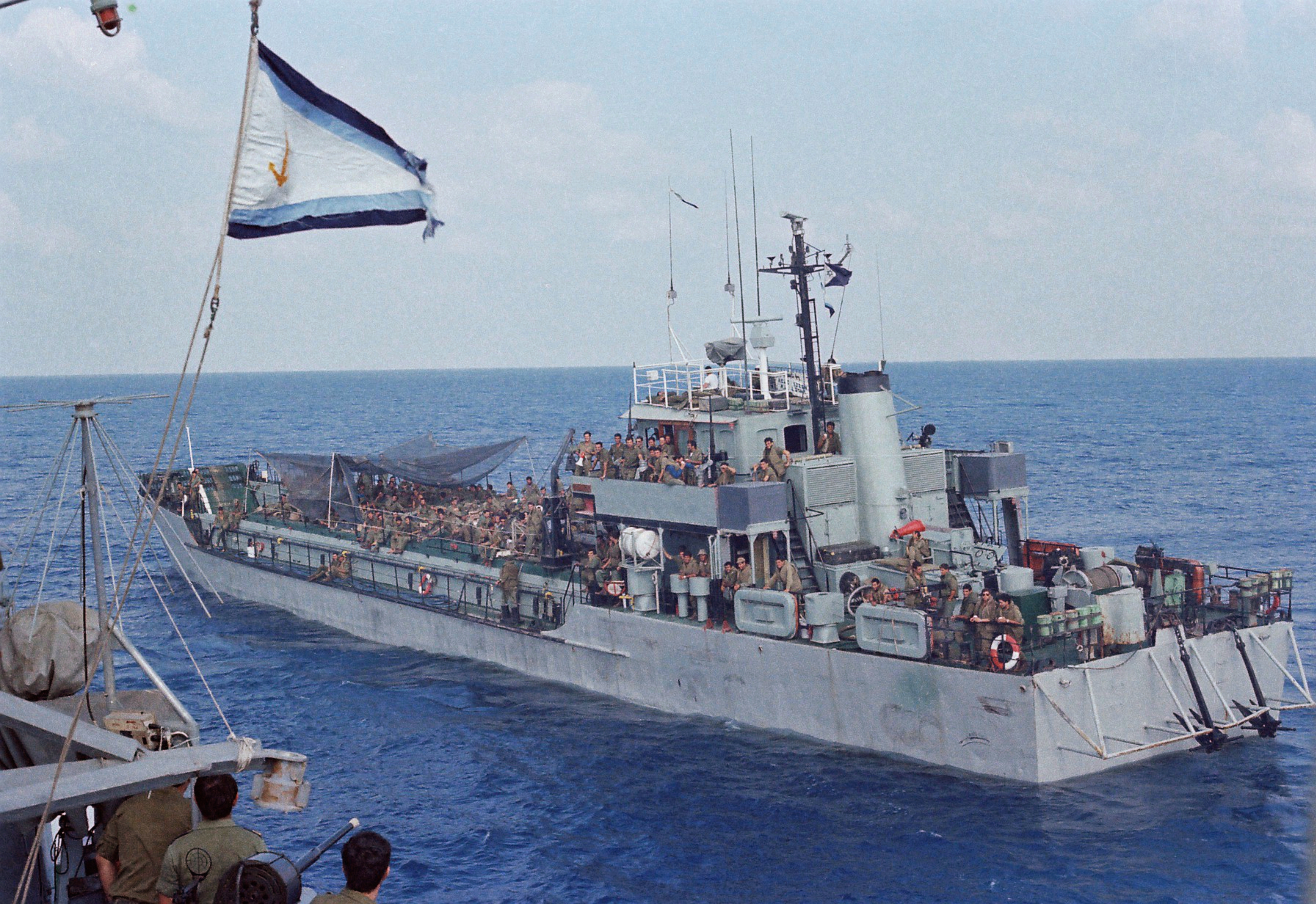 הנחתת אח"י בת שבע נושאת רכב קרבי וחיל רגלים בשיט לנחיתה הראשונה.